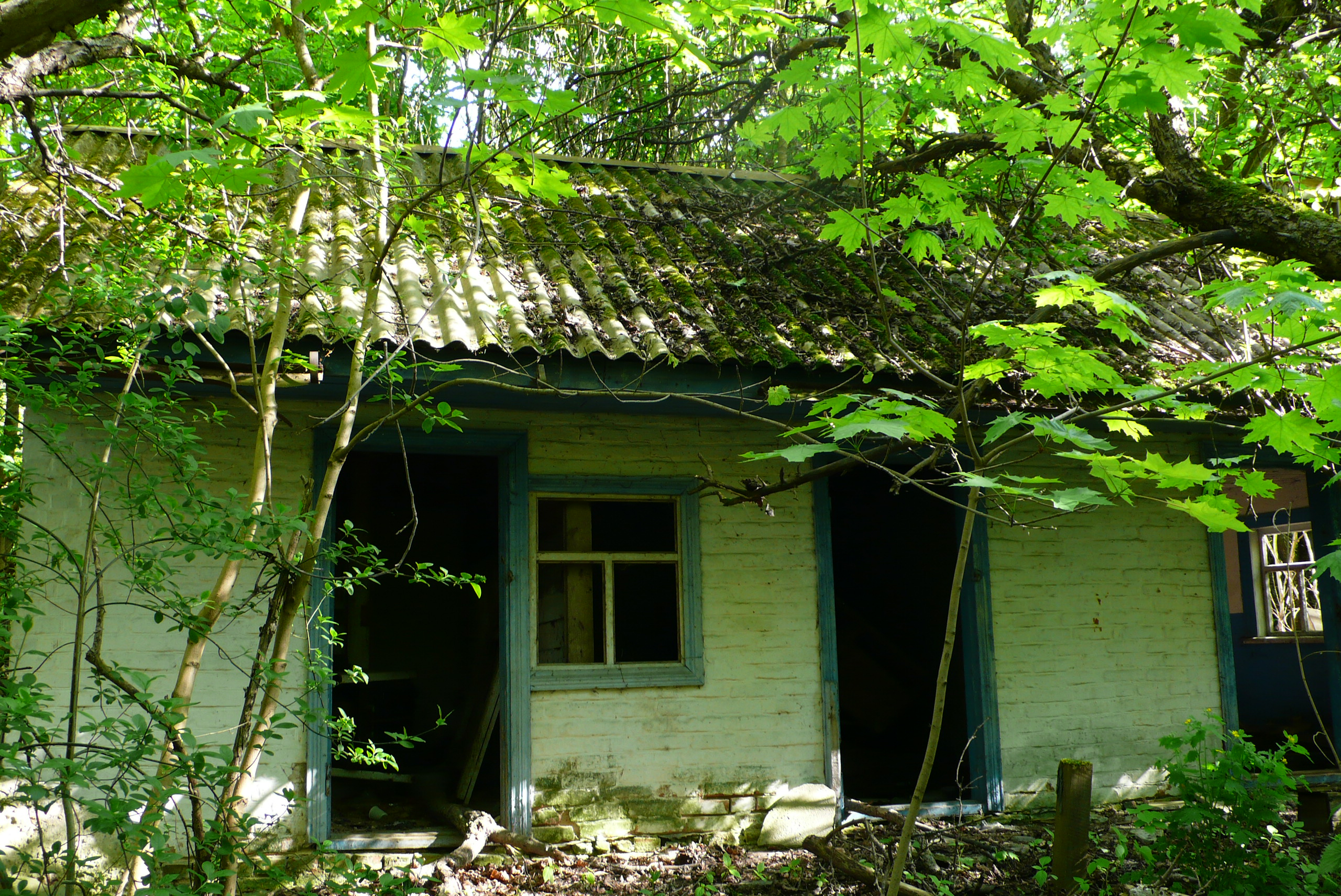 В Чернобыле заброшенный дом